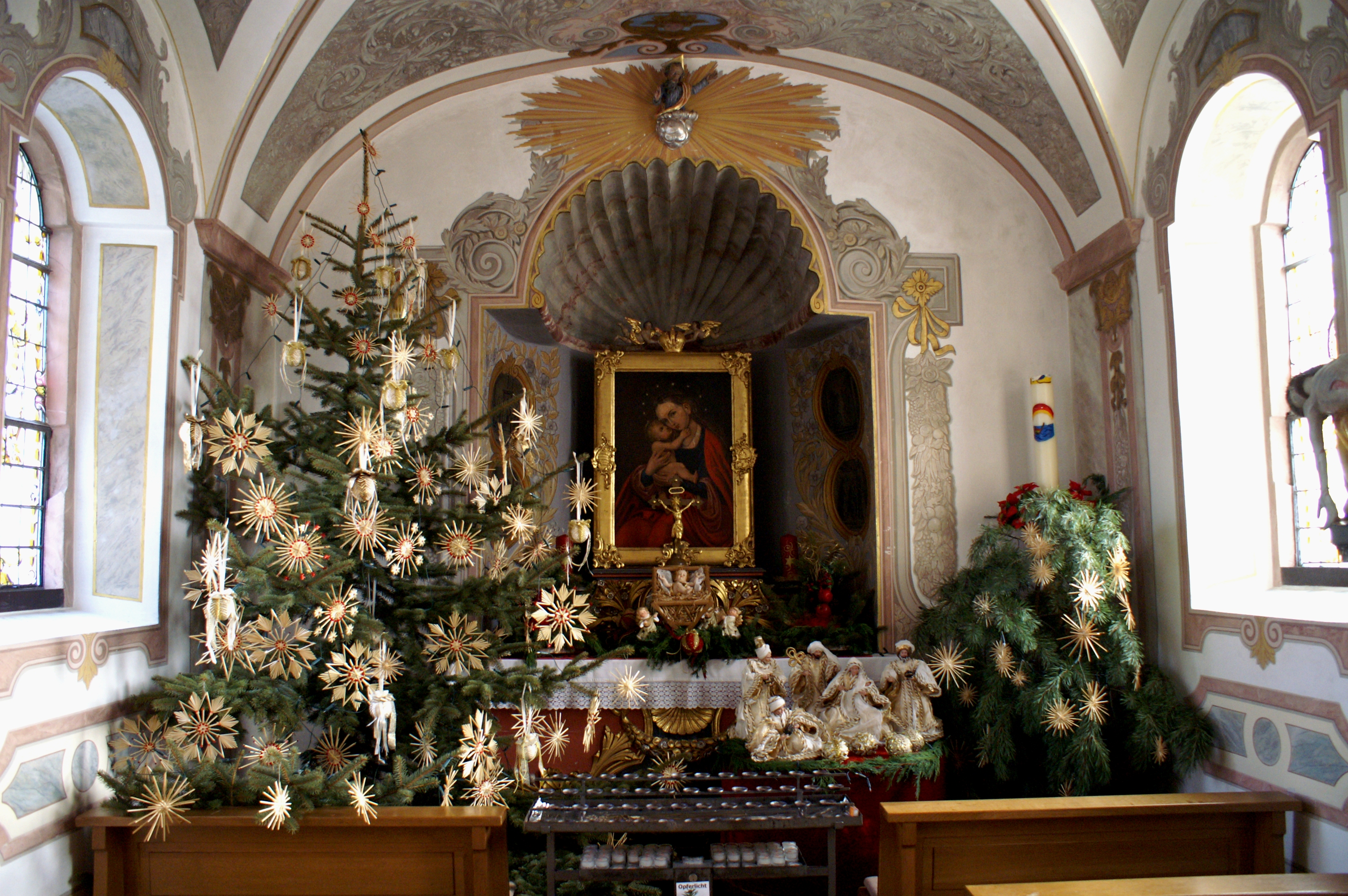 Wallfahrtskapelle Maria Hilf beim Schloss Oberherrlingen